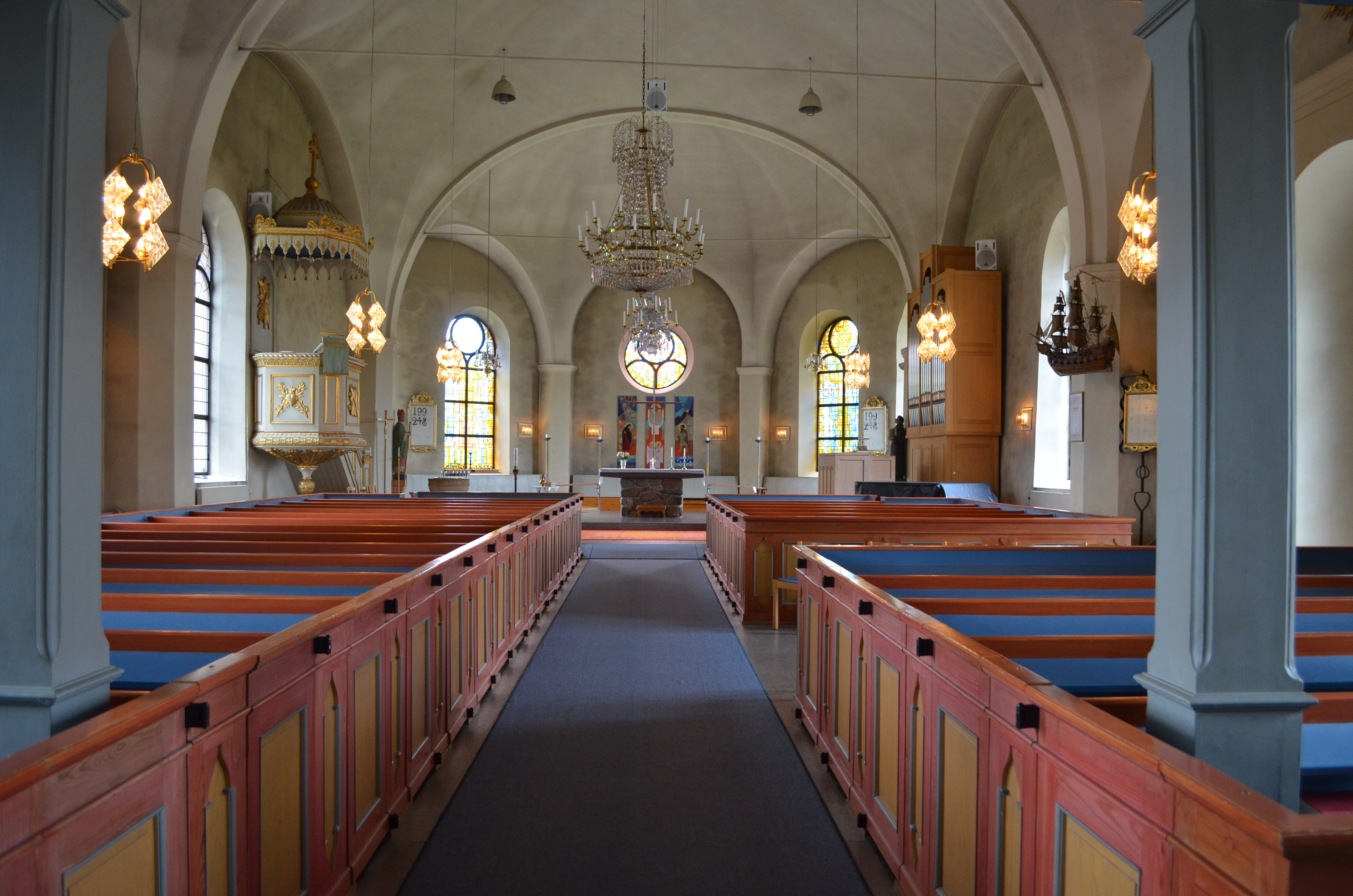 Norrtälje kyrkas kyrkrum